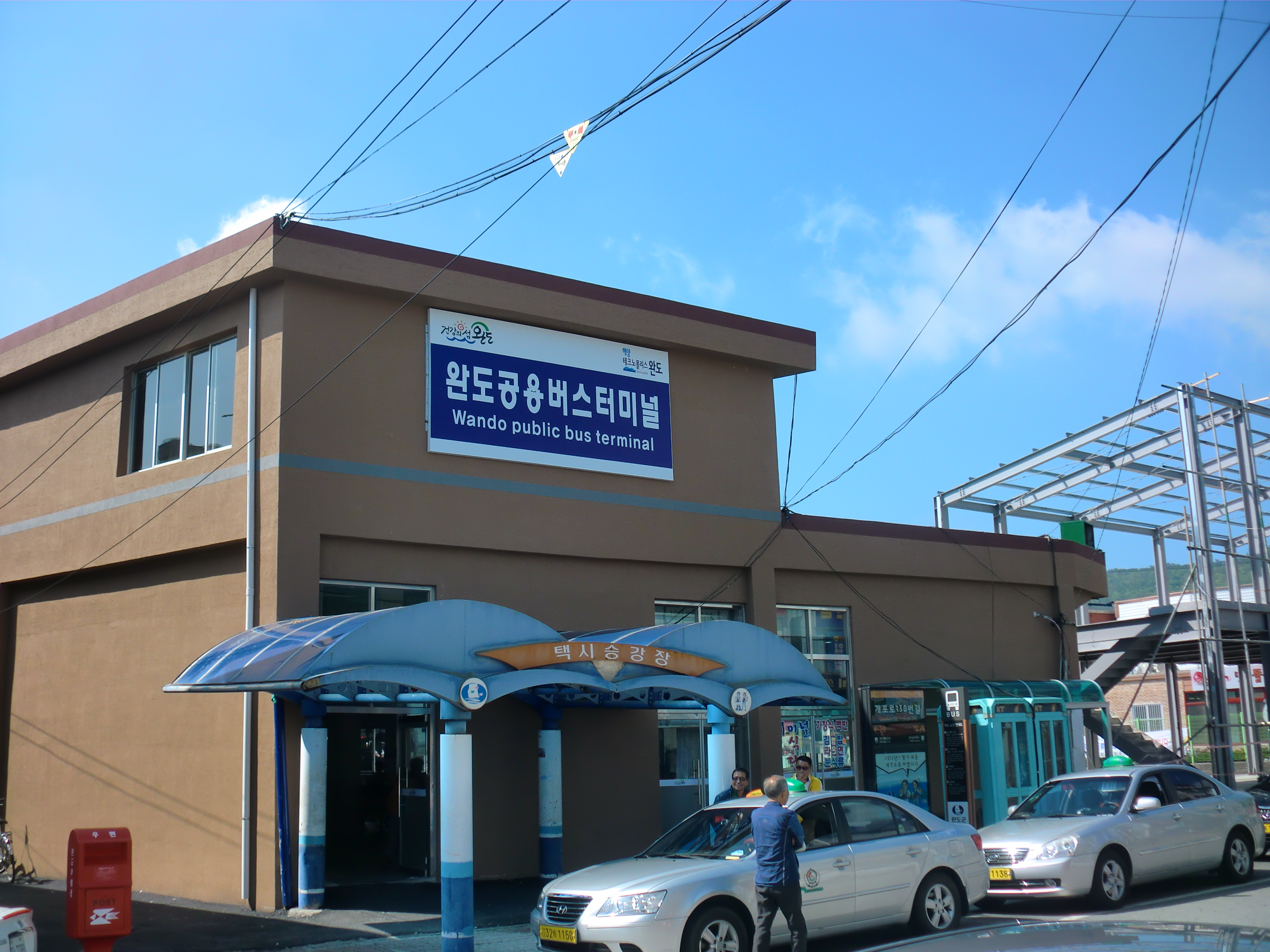 전라남도 완도군에 있는 완도공용버스터미널